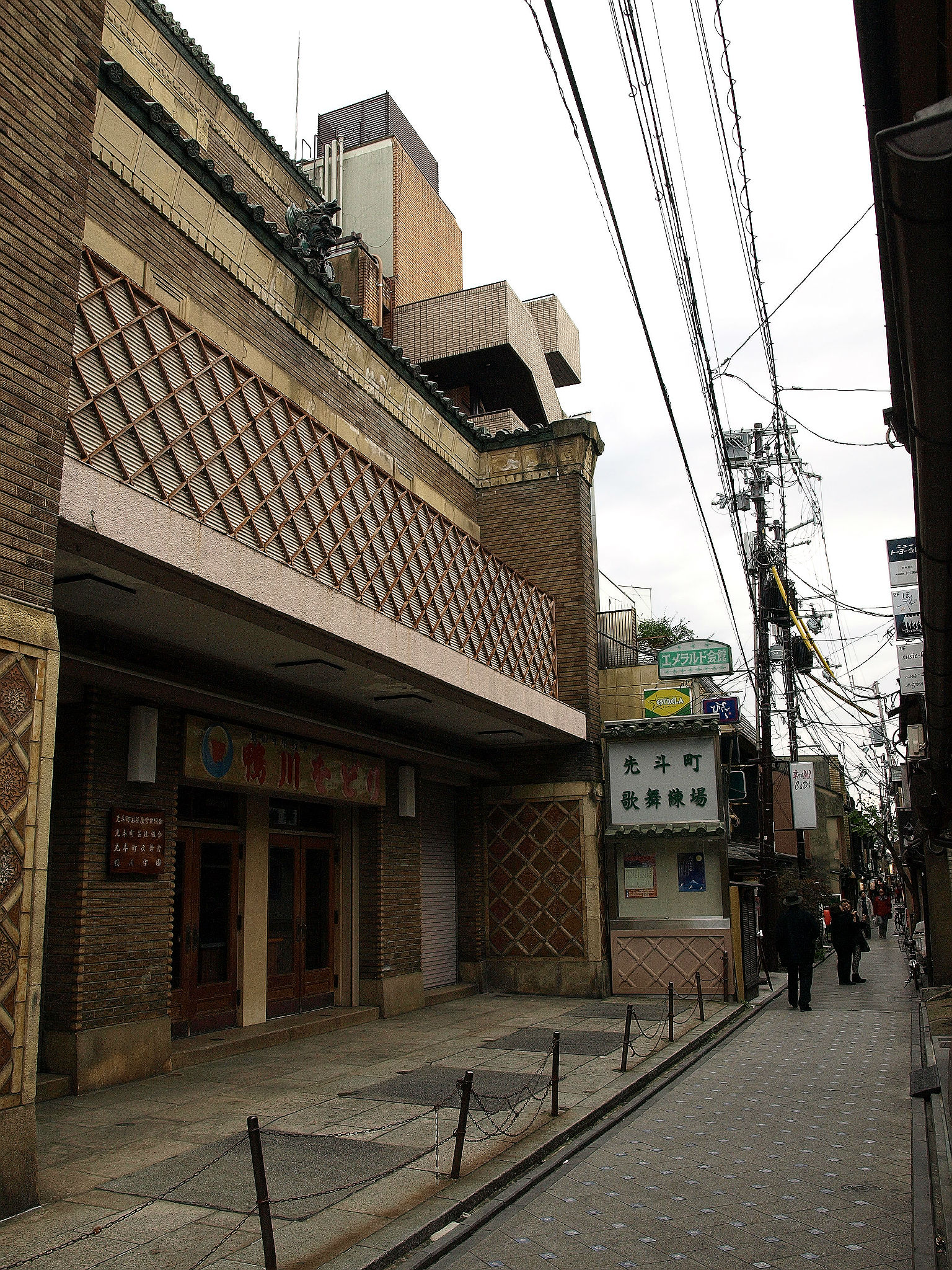 先斗町歌舞練場 入口 京都市中京区